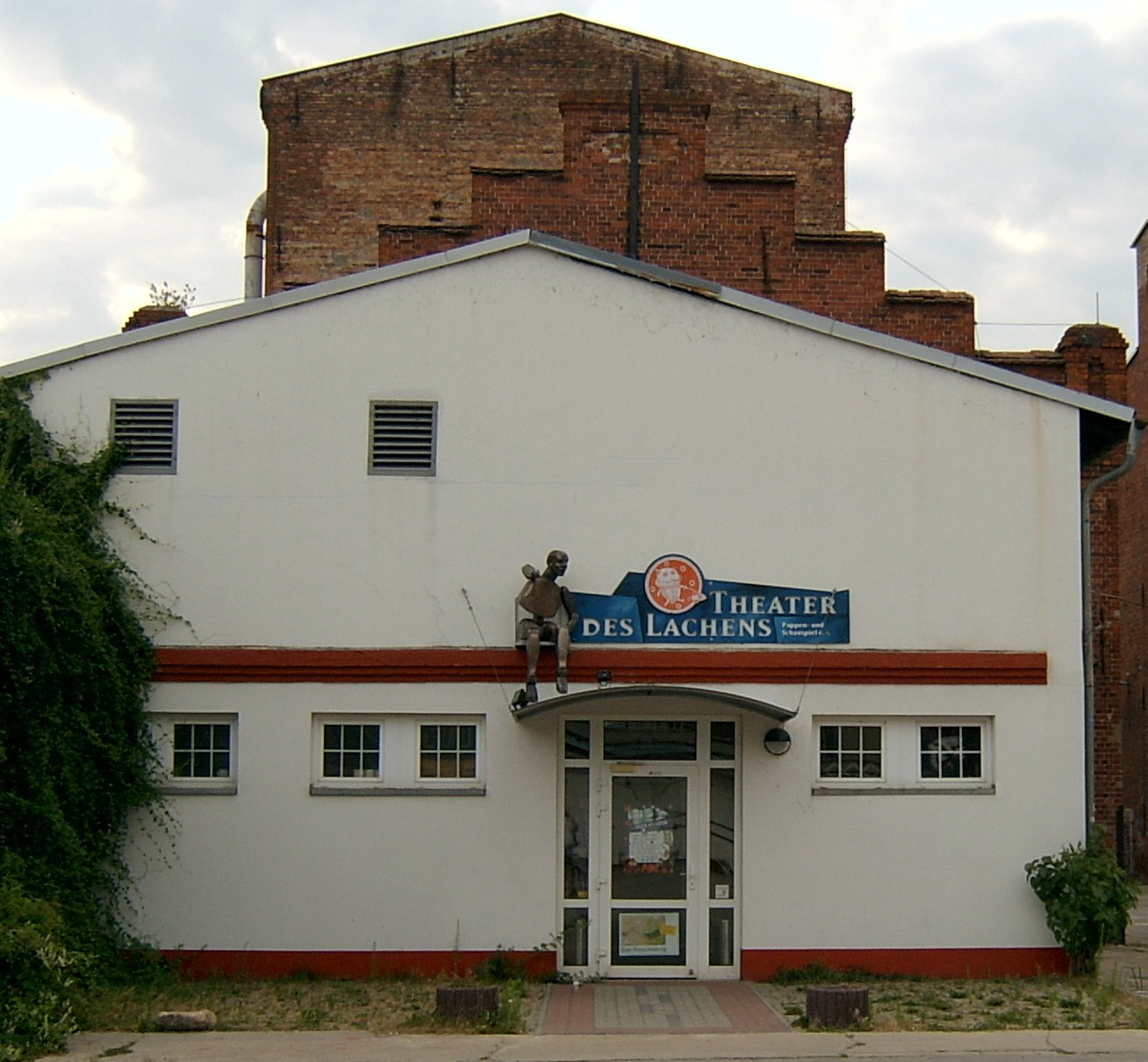 Das Theater des Lachens in der Ziegelstrasse in Frankfurt (Oder)